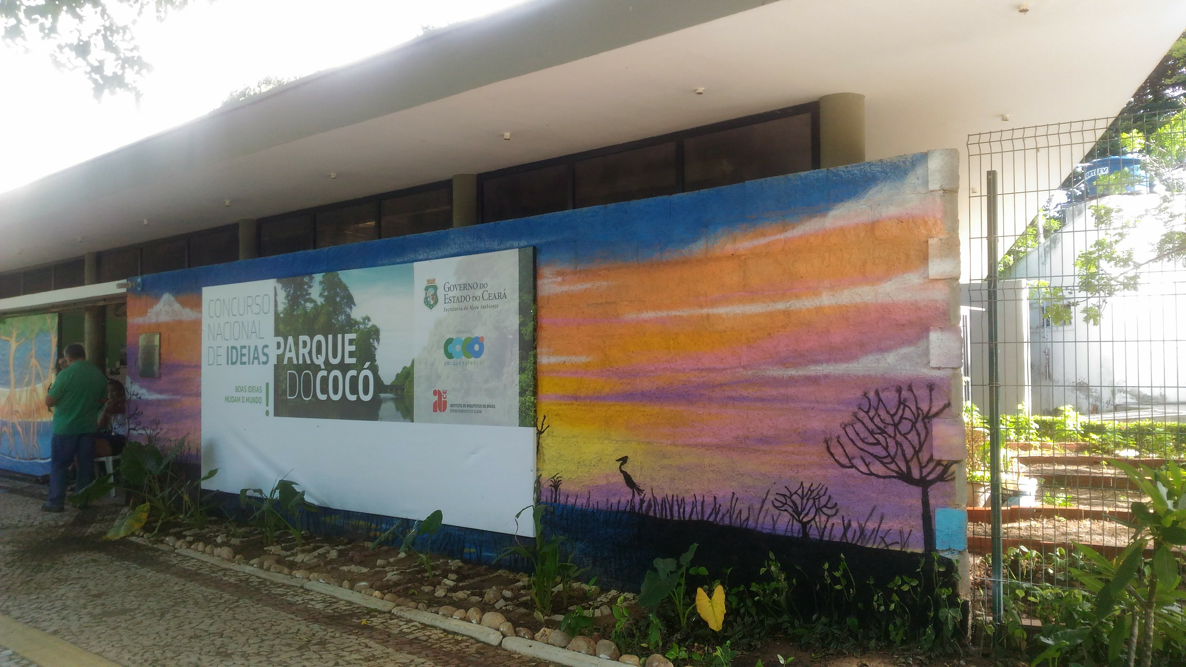 Placa avisando sobre o concurso nacional de ideias para o parque estadual do Cocó em Fortaleza.